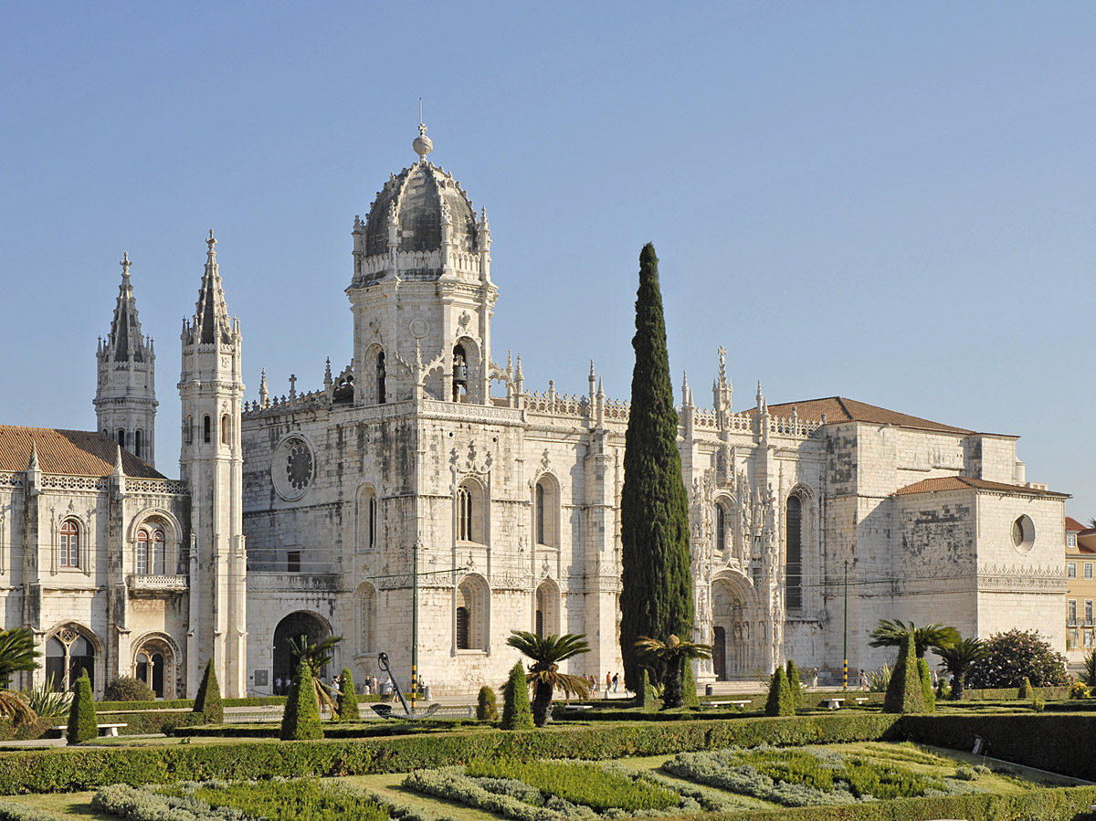 Fondé par le Roi Manuel, le monastère des Hiéronymites a été construit à partir de 1502, peu après le retour des Indes de Vasco de Gama. Initialement de style gothique, il a été modifié jusqu'au 19è siècle. L'église Sainte-Marie et le cloître complètent cet ensemble classé au patrimoine mondial par l'UNESCO.